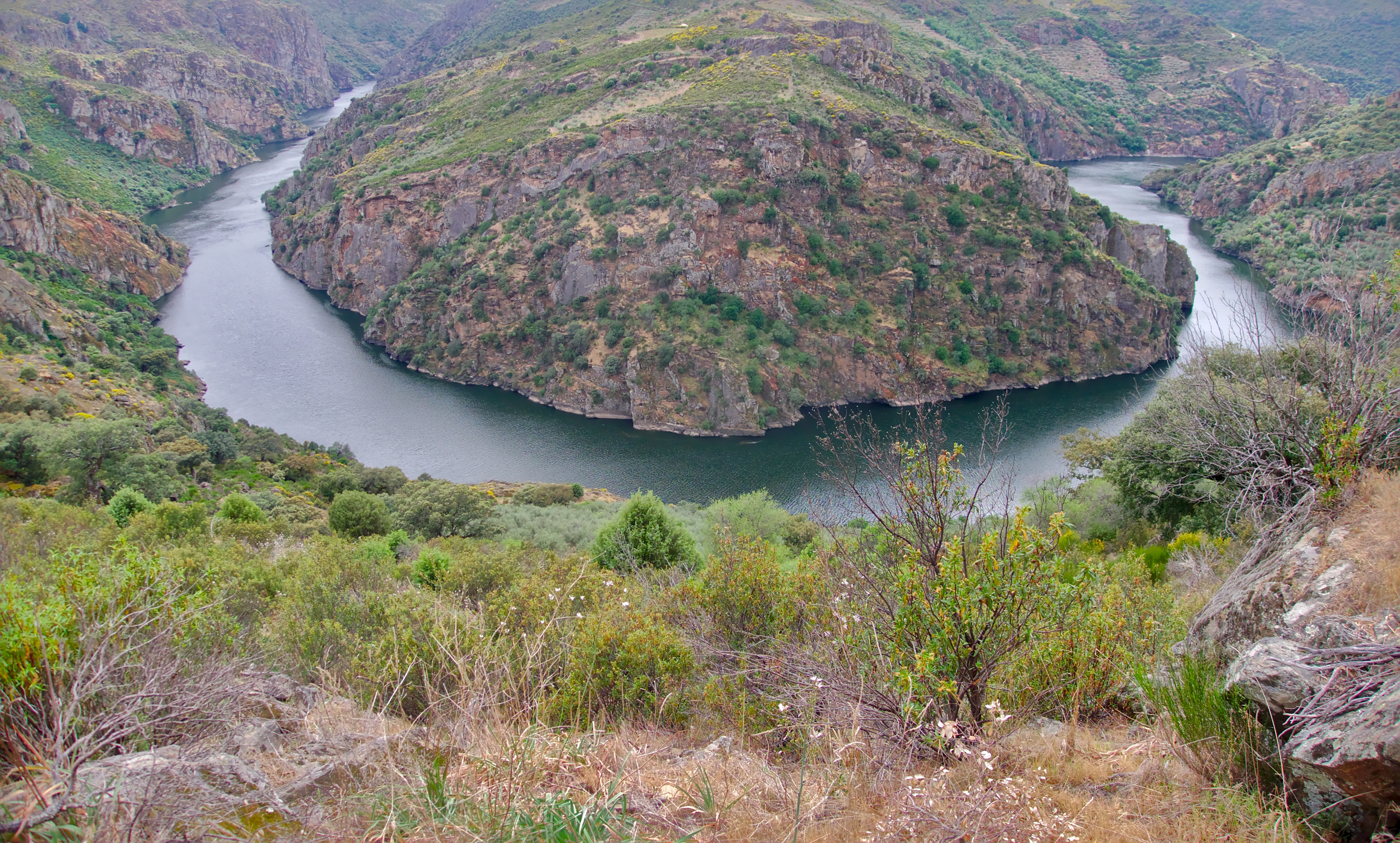 Vista del Duero entre Fermoselle y Pinilla de Fermoselle, desde el sender GR14. This is a photography of a Special Area of Conservation in Spain with the ID: ES4150096. Natura2000 entry, EEA entry